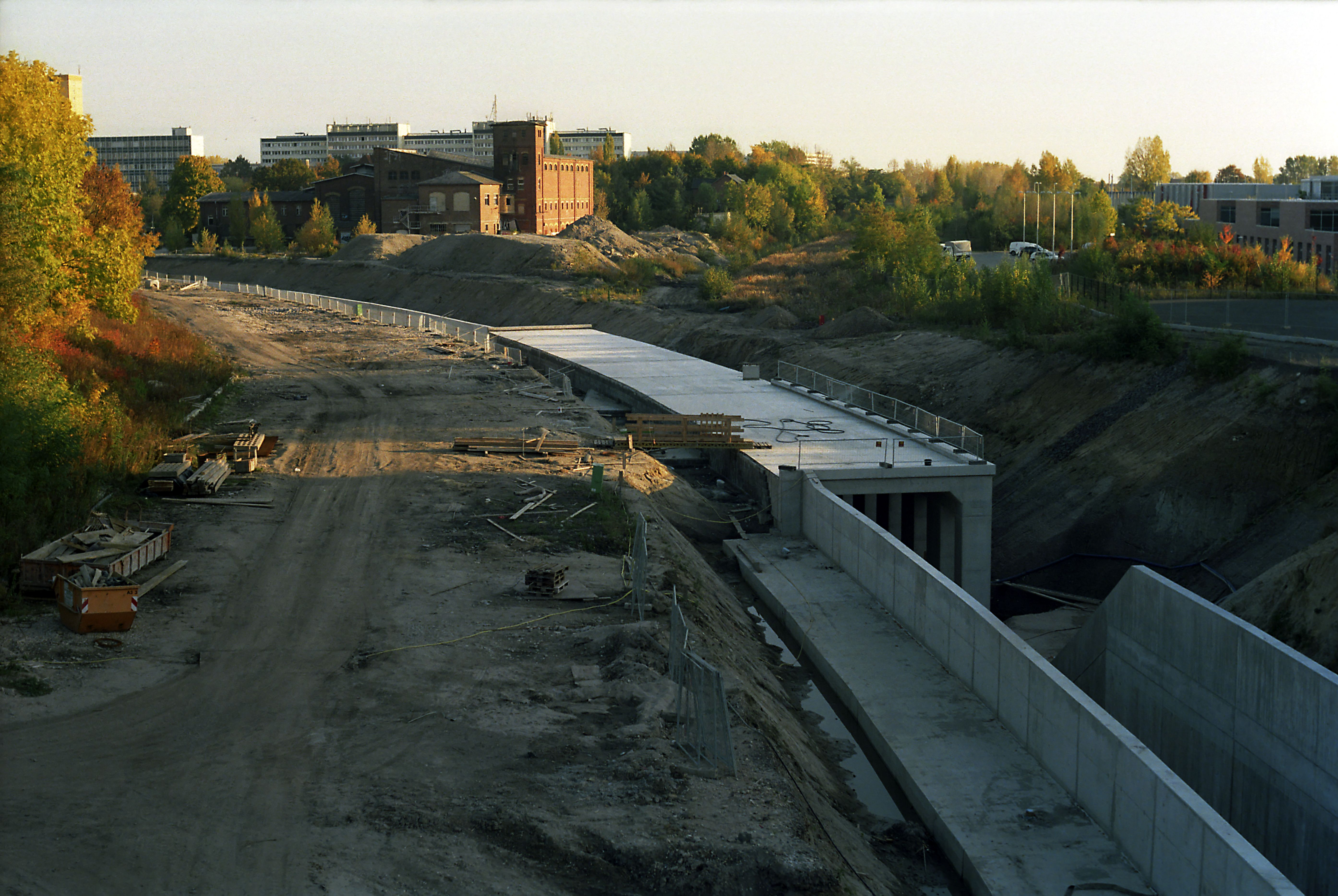 Niveaufreie Trennung der Strecken nach Altenburg und Stötteritz (–Wurzen), südlich der Richard-Lehmann-Straße